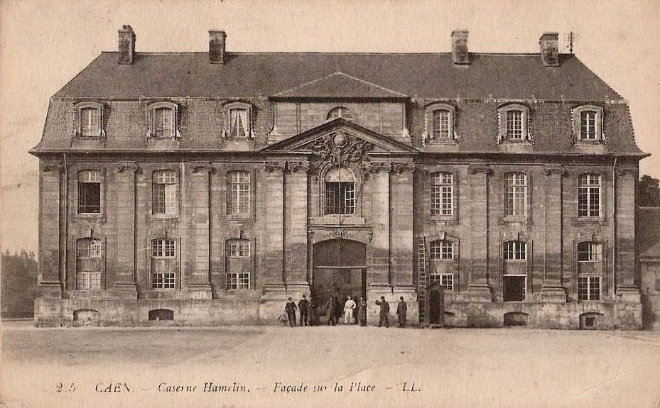 Caserne Hamelin, Caen (Calvados, Basse-Normandie).